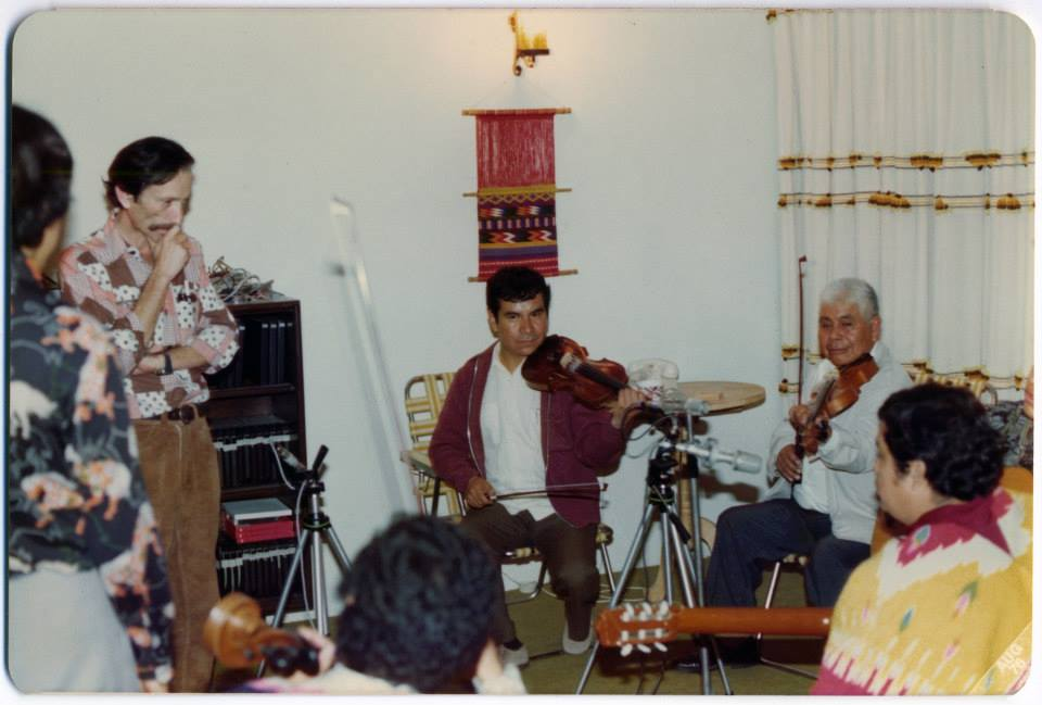 Fotografía